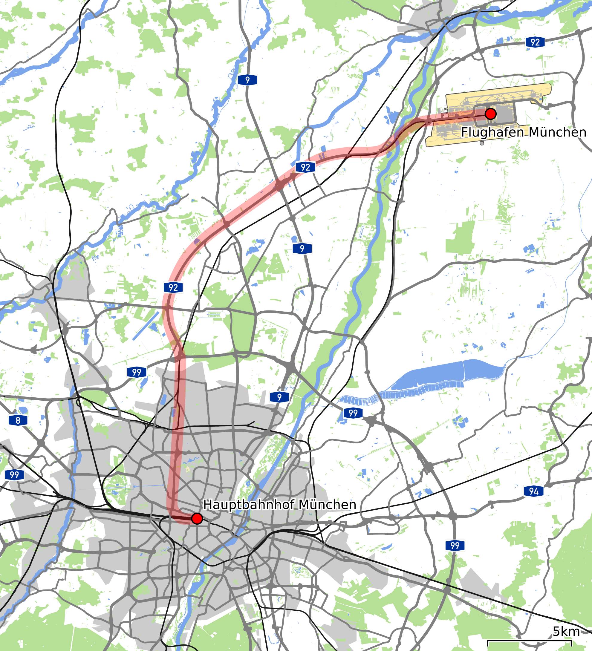 Karte des geplanten Verlaufs des Transrapid München